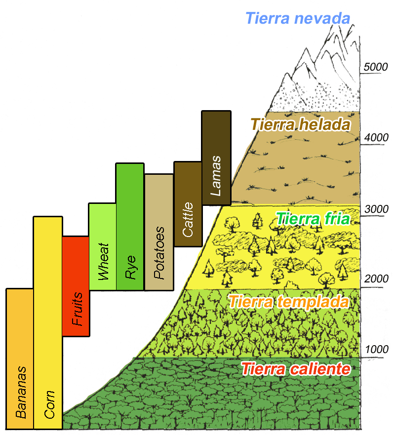 La bildo estas kopiita de de. La originala priskribo estas: Bildbeschreibung; Hoehenstufen in den Anden, Altitudinal variation; Digitalisiertung einer eigenen Zeichnung aus dem Geografieunterricht